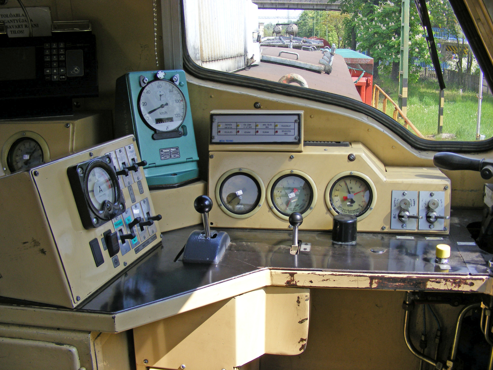 A remotorizált mozdonyok átalakított vezetőasztala.